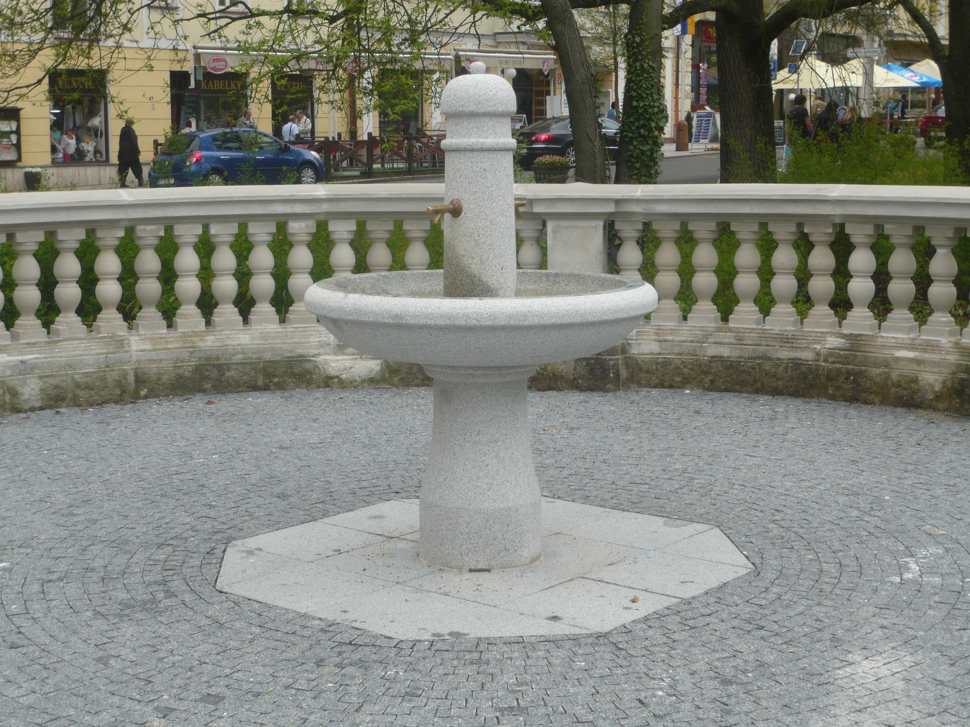 Balbínův pramen, Mariánské Lázně